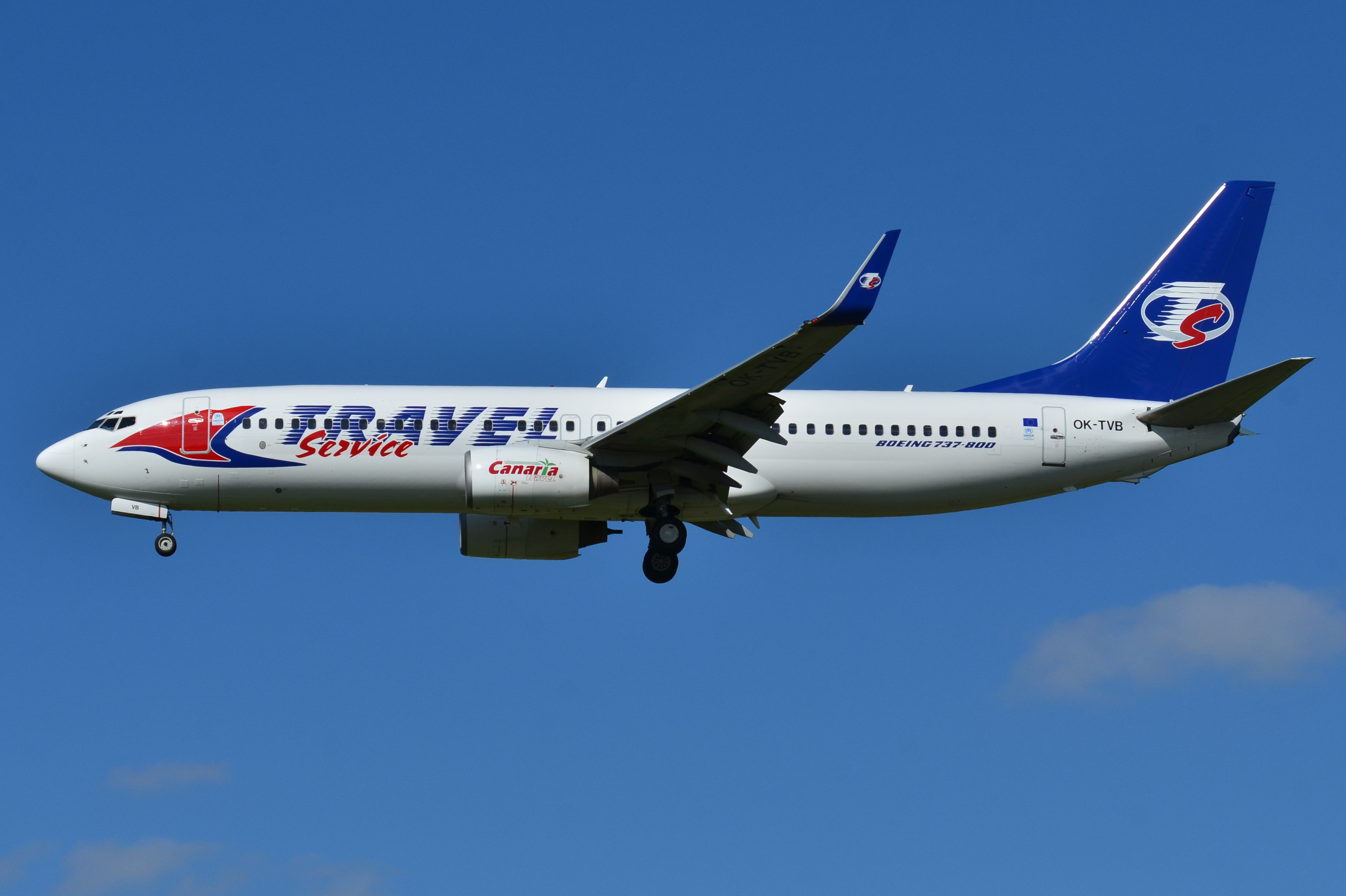 Photo prise à l'aéroport de Toulouse-Blagnac (LFBO) en France. Picture take at Toulouse-Blagnac Airport (LFBO) in France.